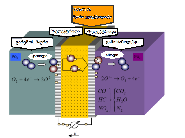 სენსორის სიგნალის წარმოქმნის პრინციპი